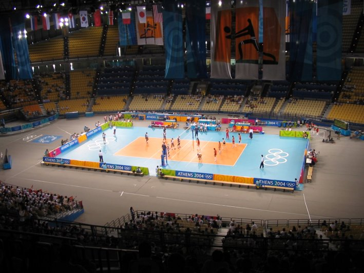 Innenansicht des Stadio Irinis kai Filias (Damenbegegnung Kuba-China im Volleyball bei den Olympischen Spielen 2004)